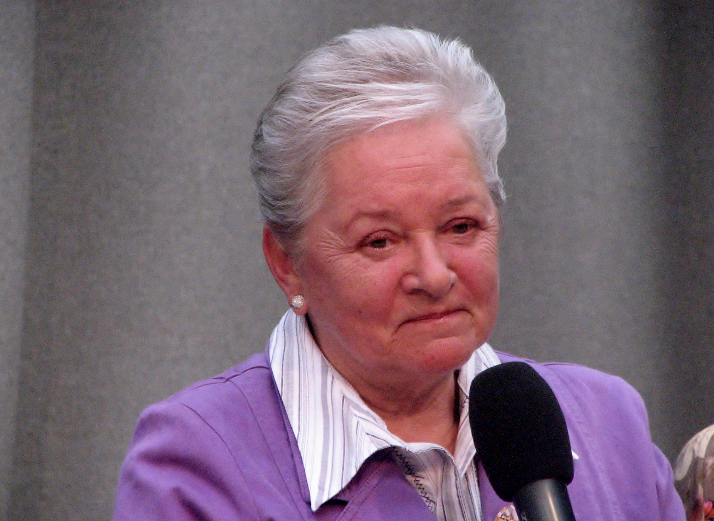 Tiiu Randviir autogrammitunnis Estonia talveaias